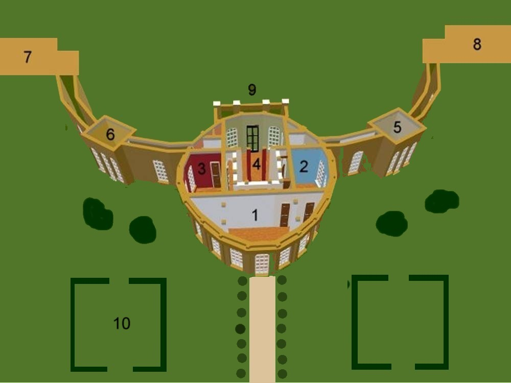 Plan drawn by User: Giano